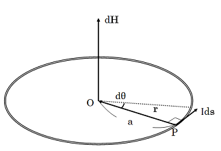 ビオ・サバールの法則の円形電流に対する運用について